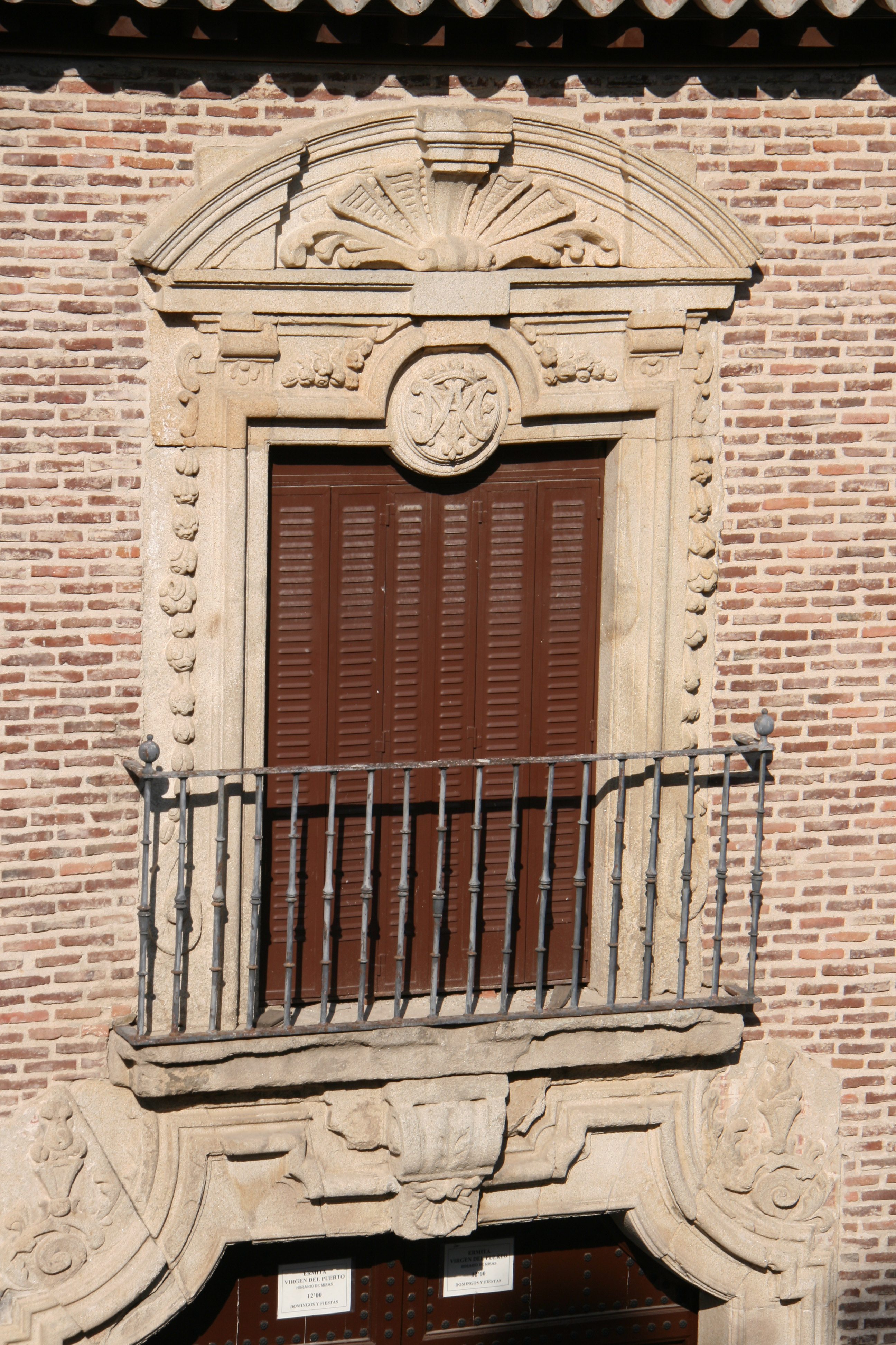 Balcón de la entrada principal - Ermita de la Virgen del Puerto - Madrid